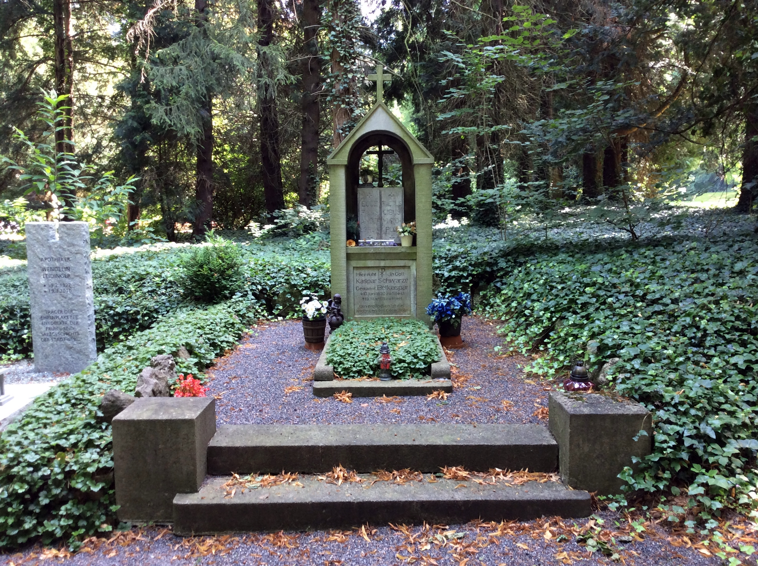 Das Ehrengrab der Stadt Werl für Kaspar Schwarze, genannt Betkaspar auf dem Parkfriedhof in Werl